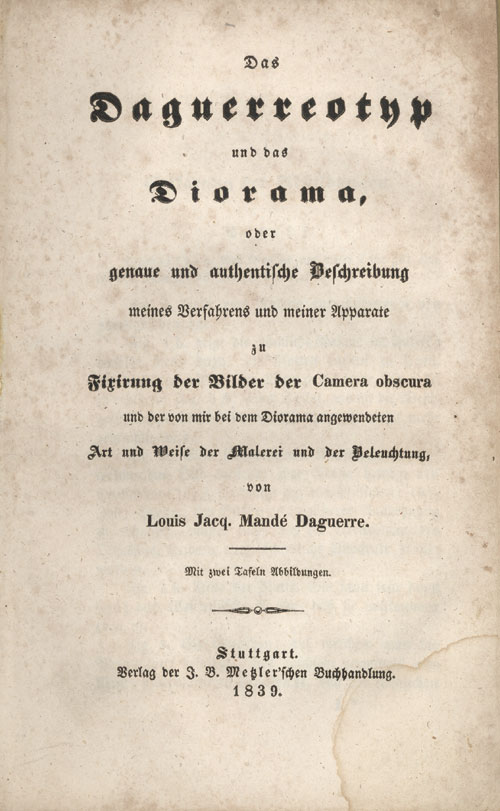 L. J. M. Daguerre: Das Daguerreotyp und das Diorama, oder genaue und authentische Beschreibung meines Verfahrens und meiner Apparate zu Fixirung der Bilder der Camera obscura und der von mir bei dem Diorama angewendeten Art und Weise der Malerei und der Beleuchtung. Metzler, Stuttgart 1839.